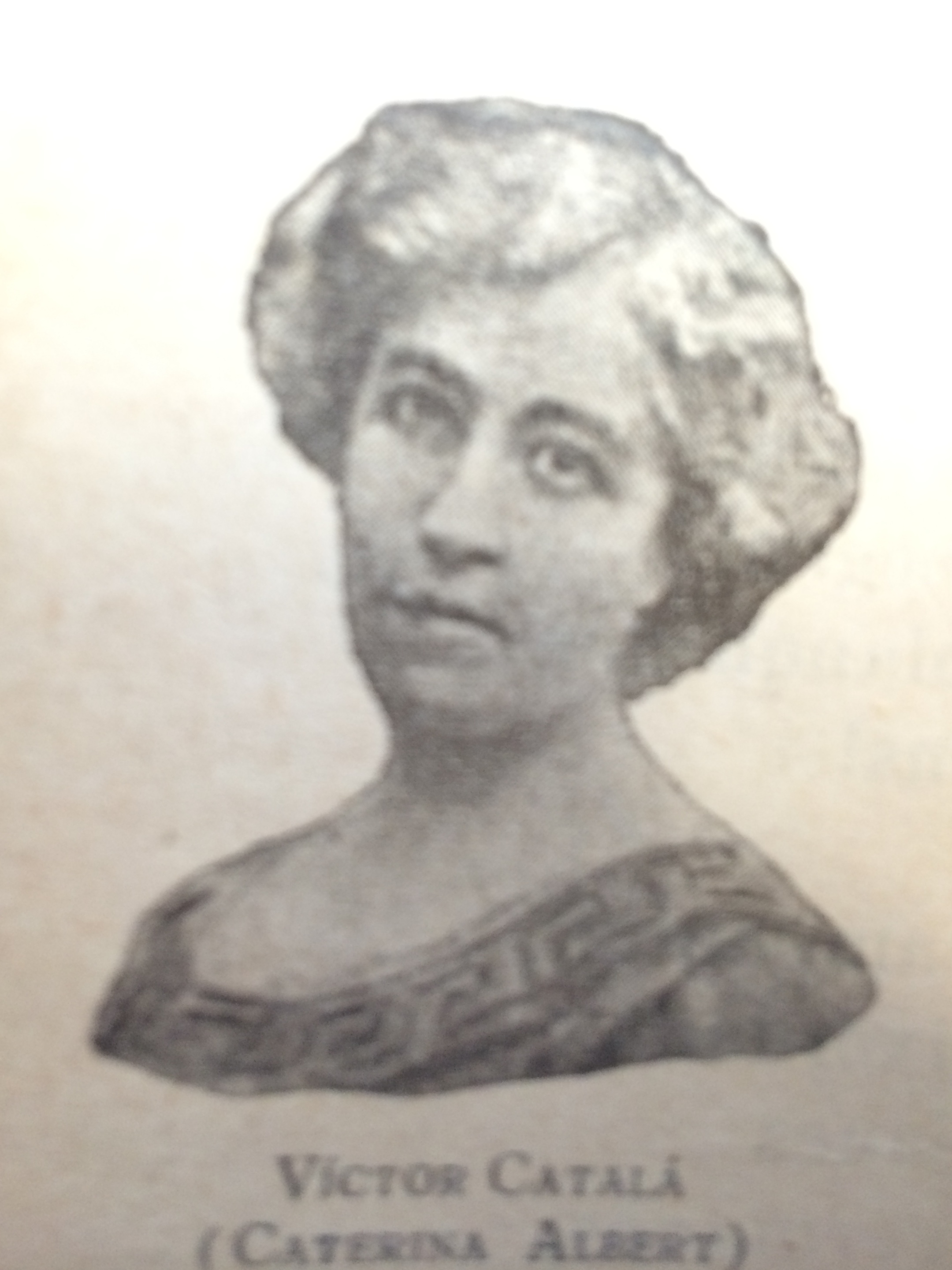 Caterina Albert i Paradís, coneguda pel seu nom de ploma Víctor Català, (l'Escala, 11 de setembre de 1869 — l'Escala, 27 de gener de 1966) fou una escriptora catalana que participà en el moviment del modernisme